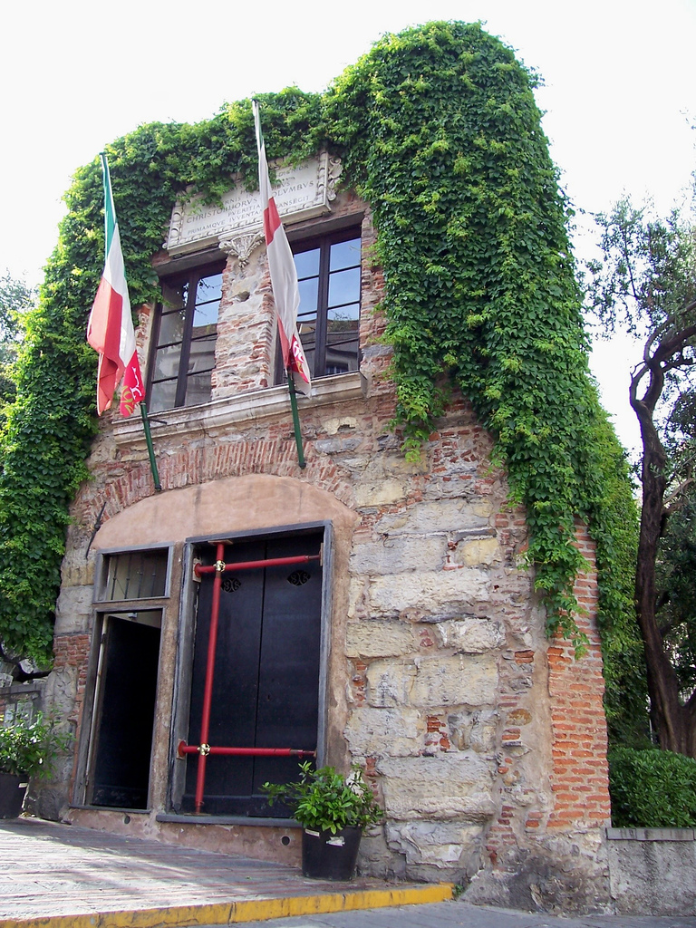 La casa di Cristoforo Colombo a Genova, vicino a Porta Soprana